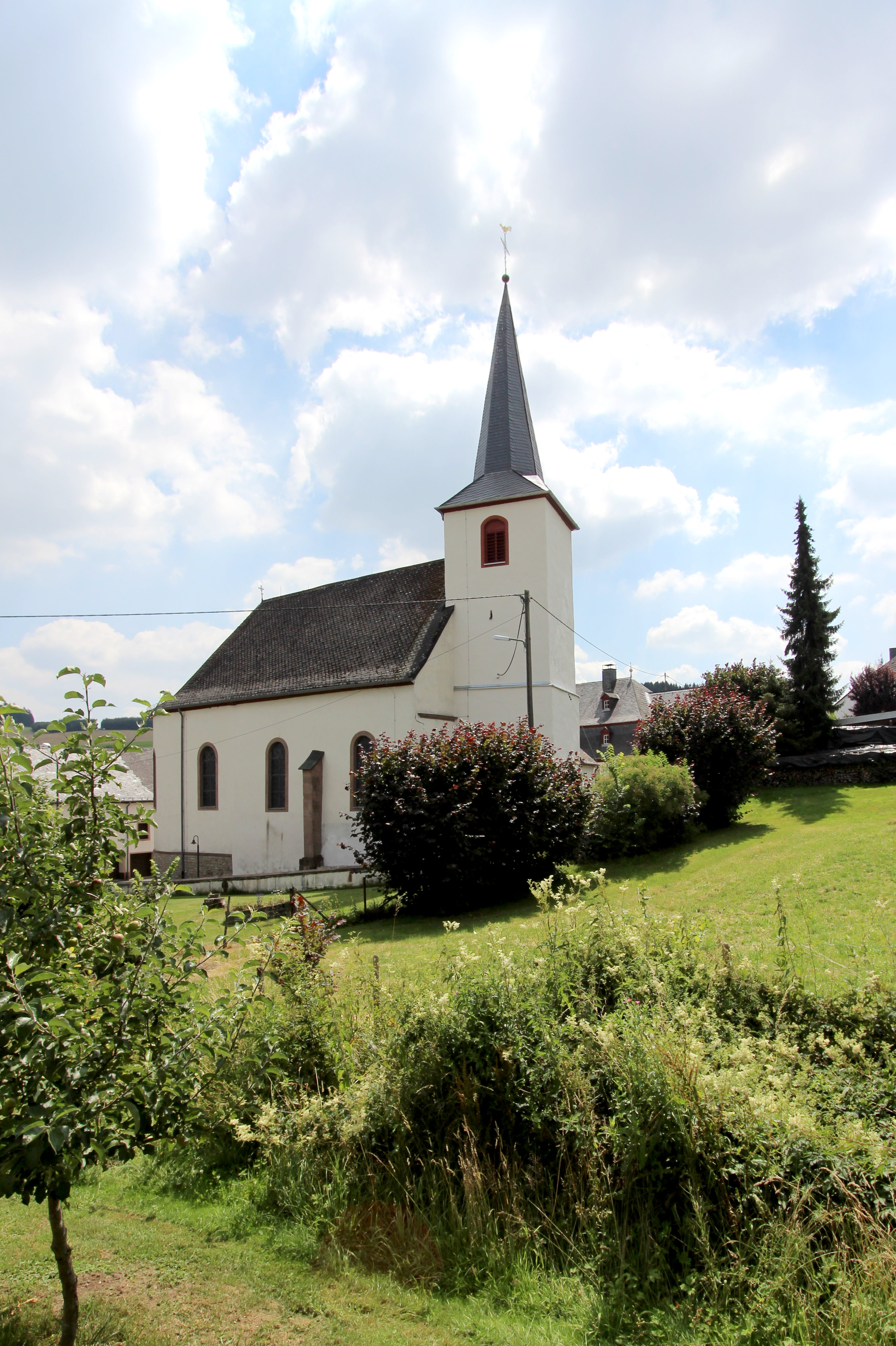 54570 Rockeskyll, Dorfstraße 41. Romanischer Westturm, ursprünglich spätgotischer Einstützenraum von 1511, 1840 erweitert, 1891 über zwei Mittelstützen neu gewölbt. Aufnahme von 2018.